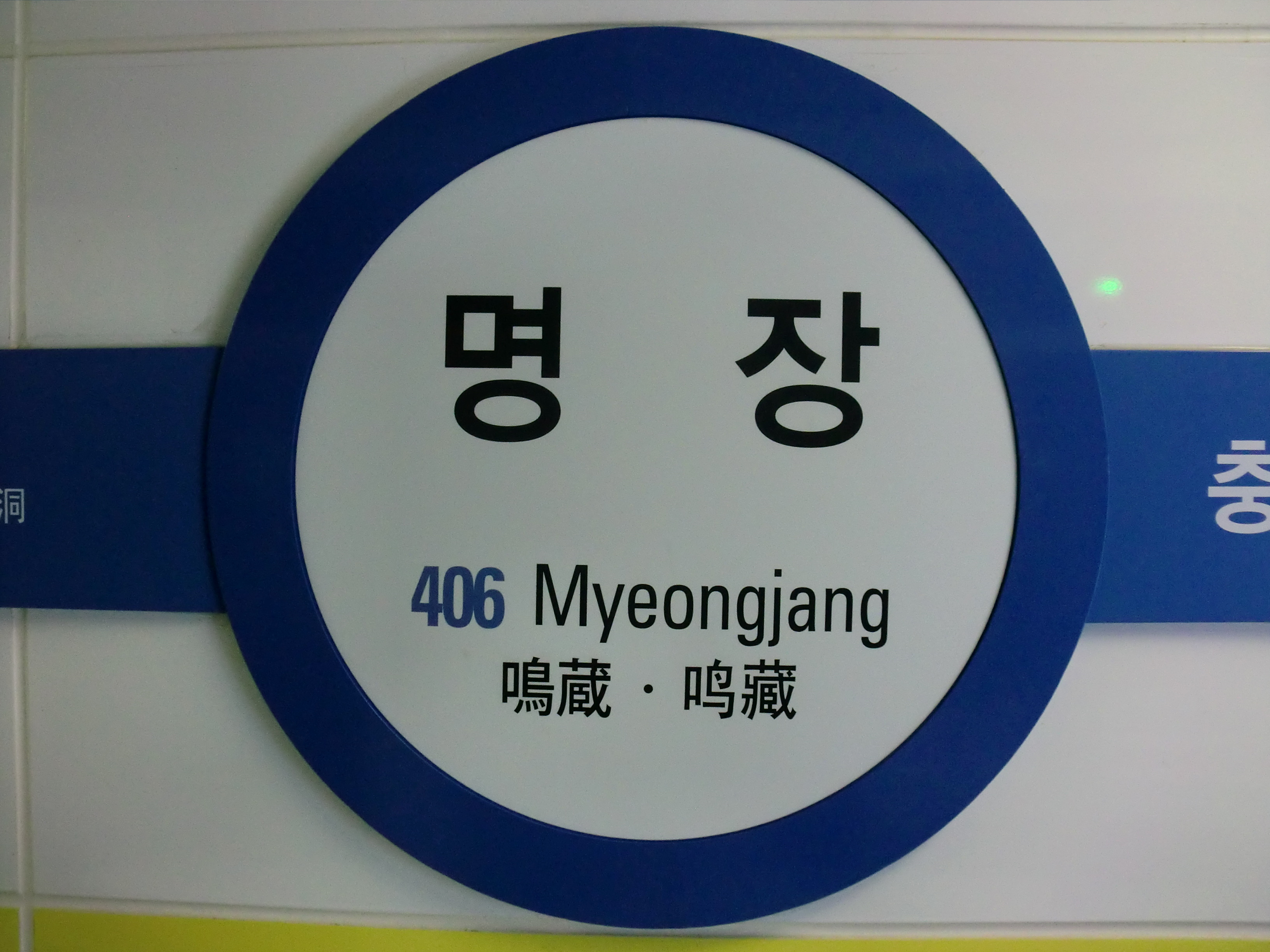 부산도시4호선 명장역의 역명판